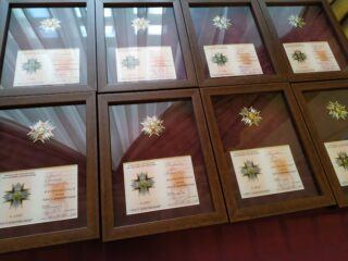 Ордени Добровольця поіменно підписані для представлених до відзнаки